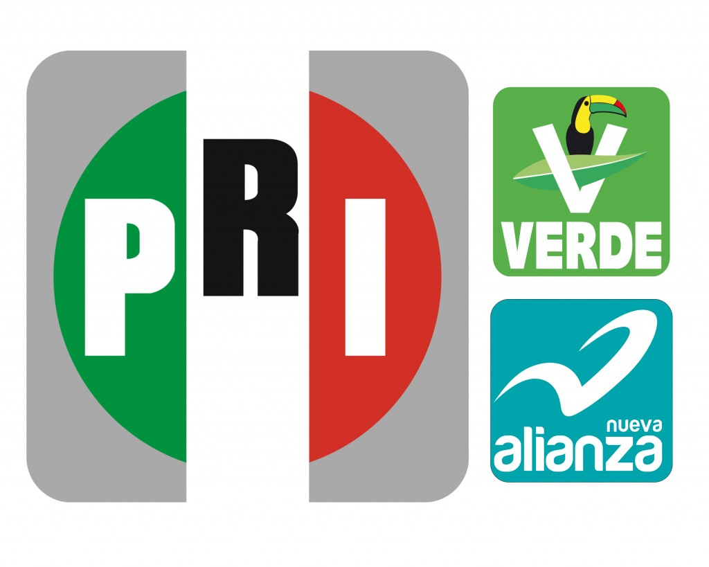 Coalición PRI, PVEM, PANAL